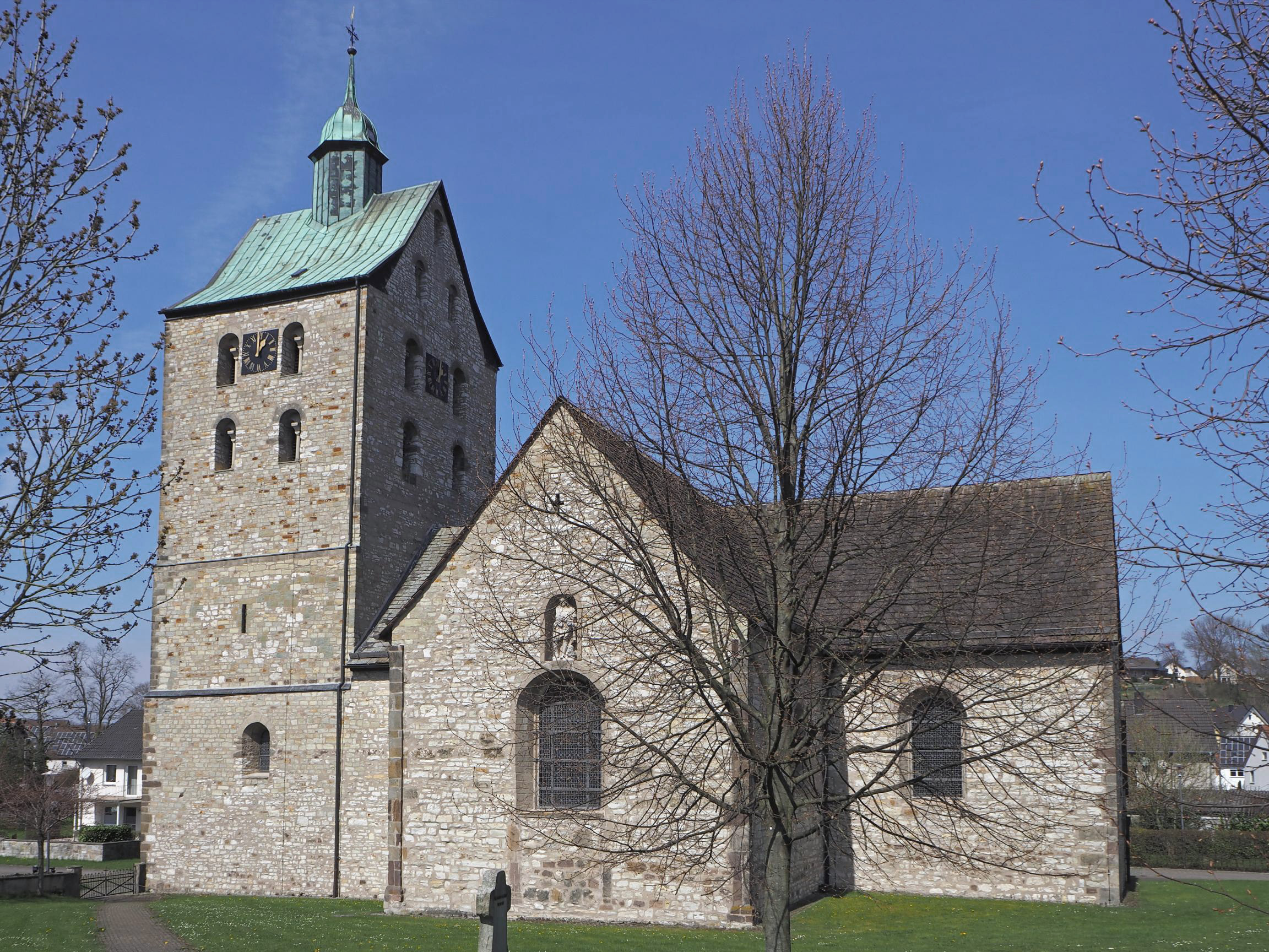 Paderborn-Neuenbeken, St. Marien, Eingangsportal